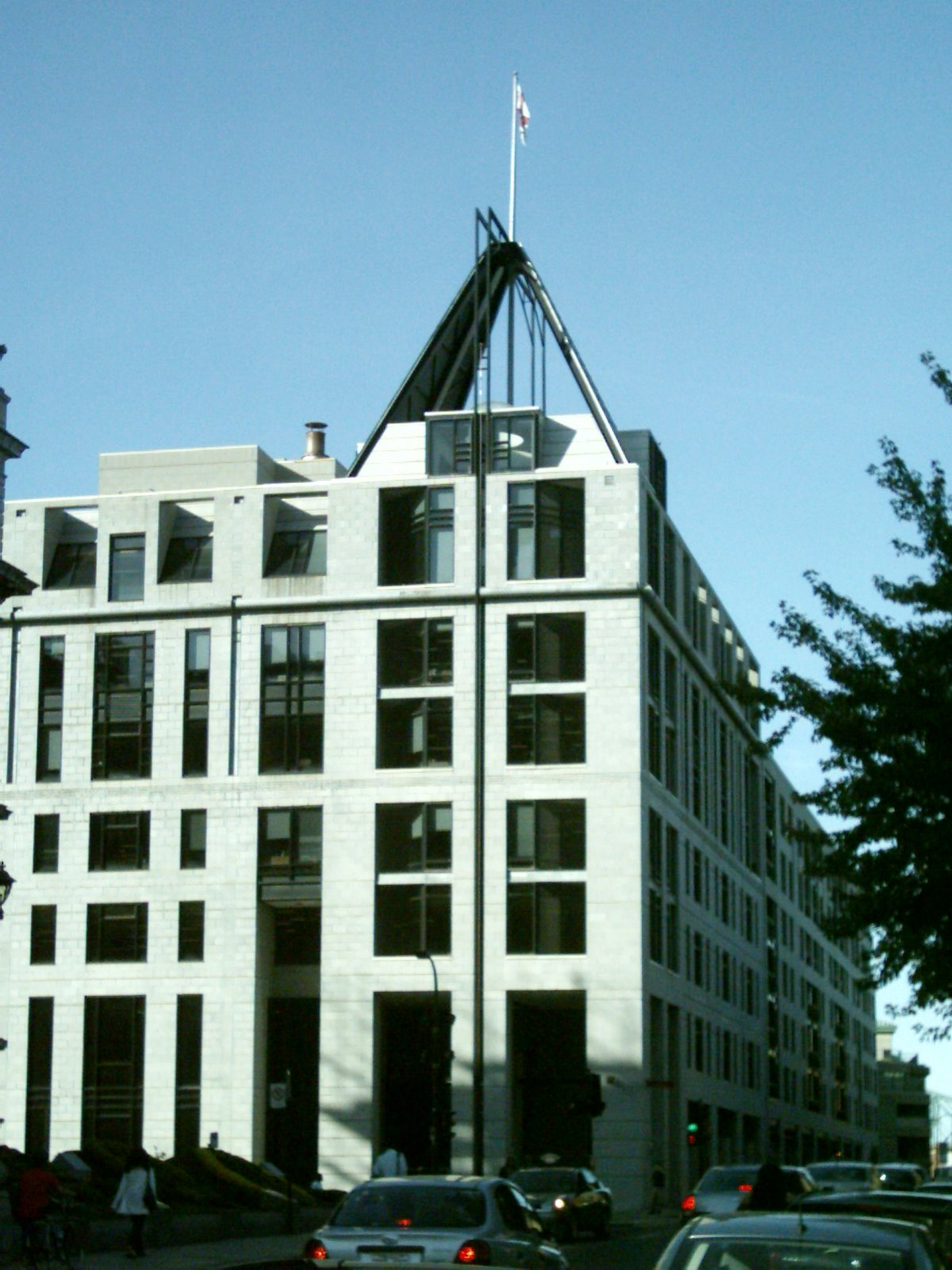 L'édifice Chaussegros-de-Léry 1, situé au 303 rue Notre-Dame Est à Montréal